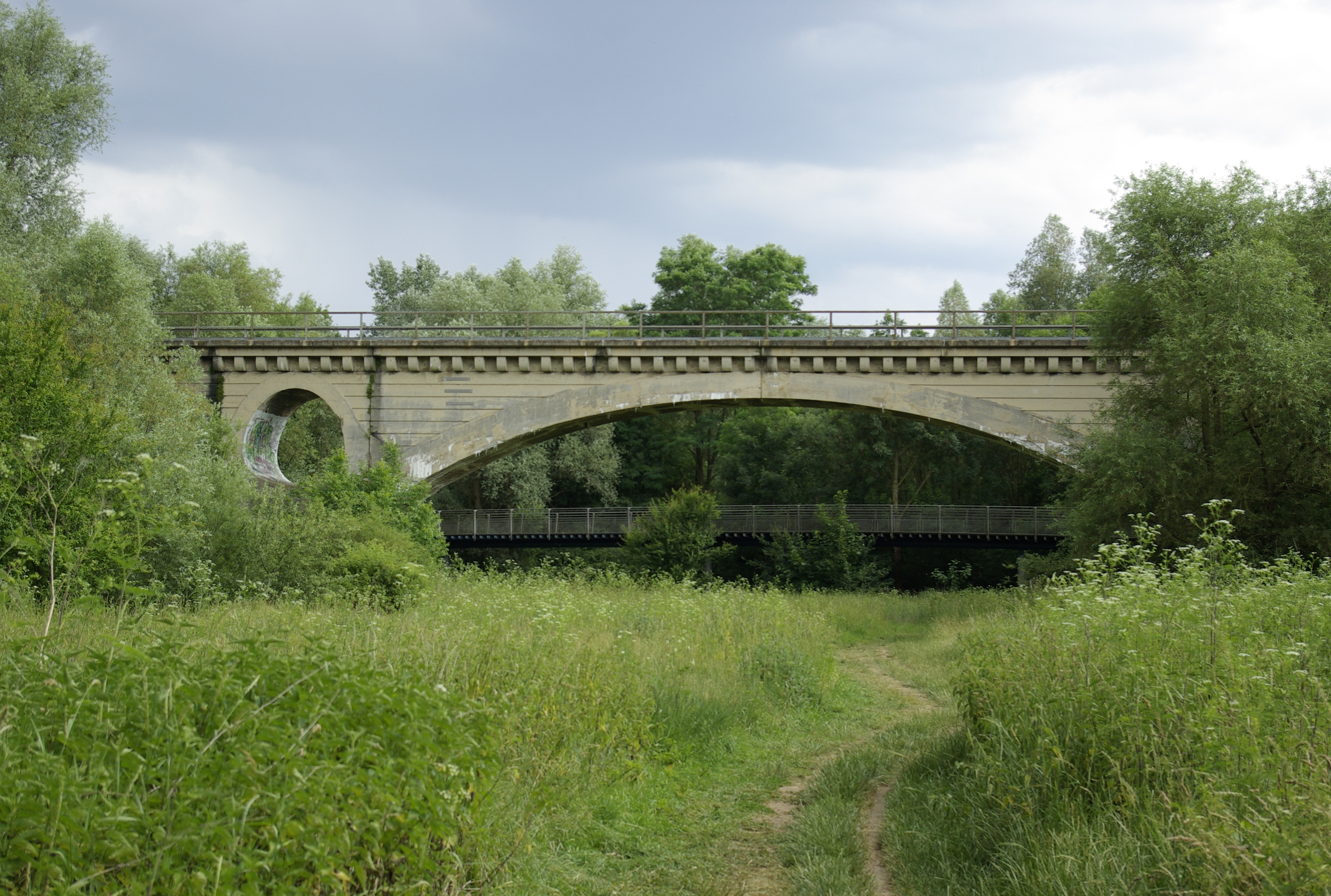 Das Pegnitztal bei Nürnberg-Muggenhof mit der Pegnitzbrücke der Ringbahn Nürnberg, dahinter der Fuchslochsteg.